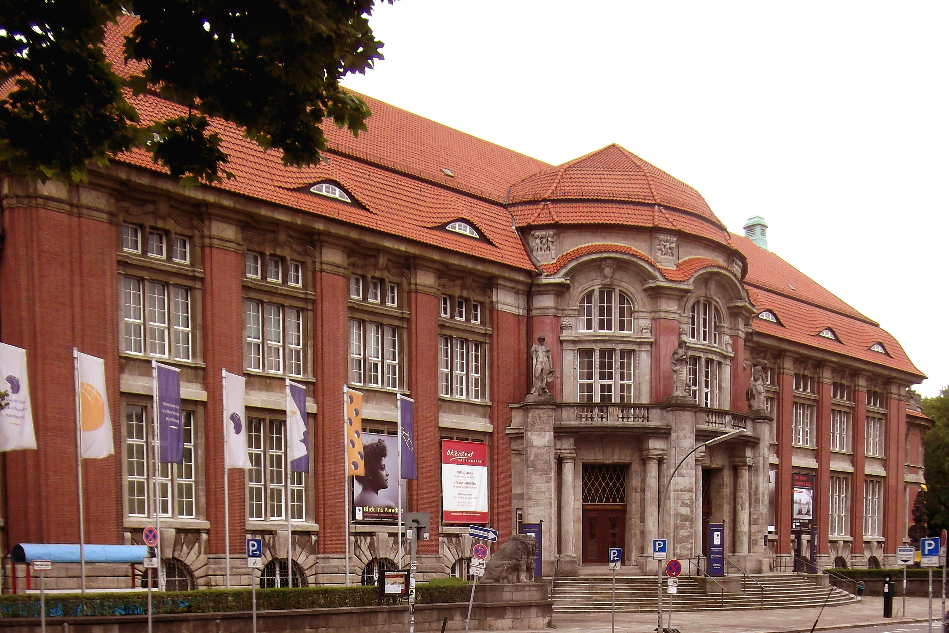 Museum für Völkerkunde Hamburg